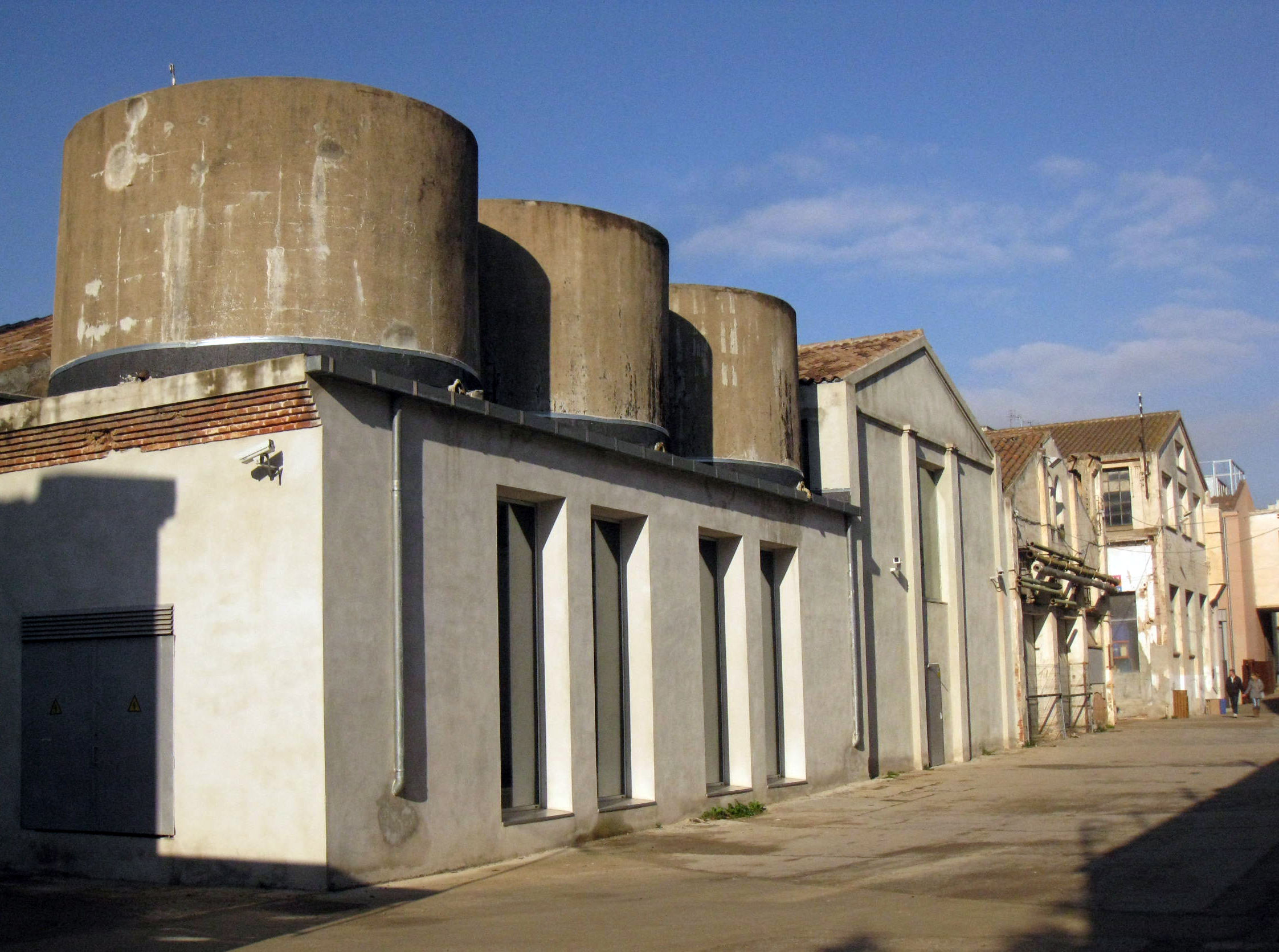 Elements interiors de l'antiga Fàbrica Roca Umbert (Granollers) Object location41° 36′ 07.98″ N, 2° 17′ 02.08″ E